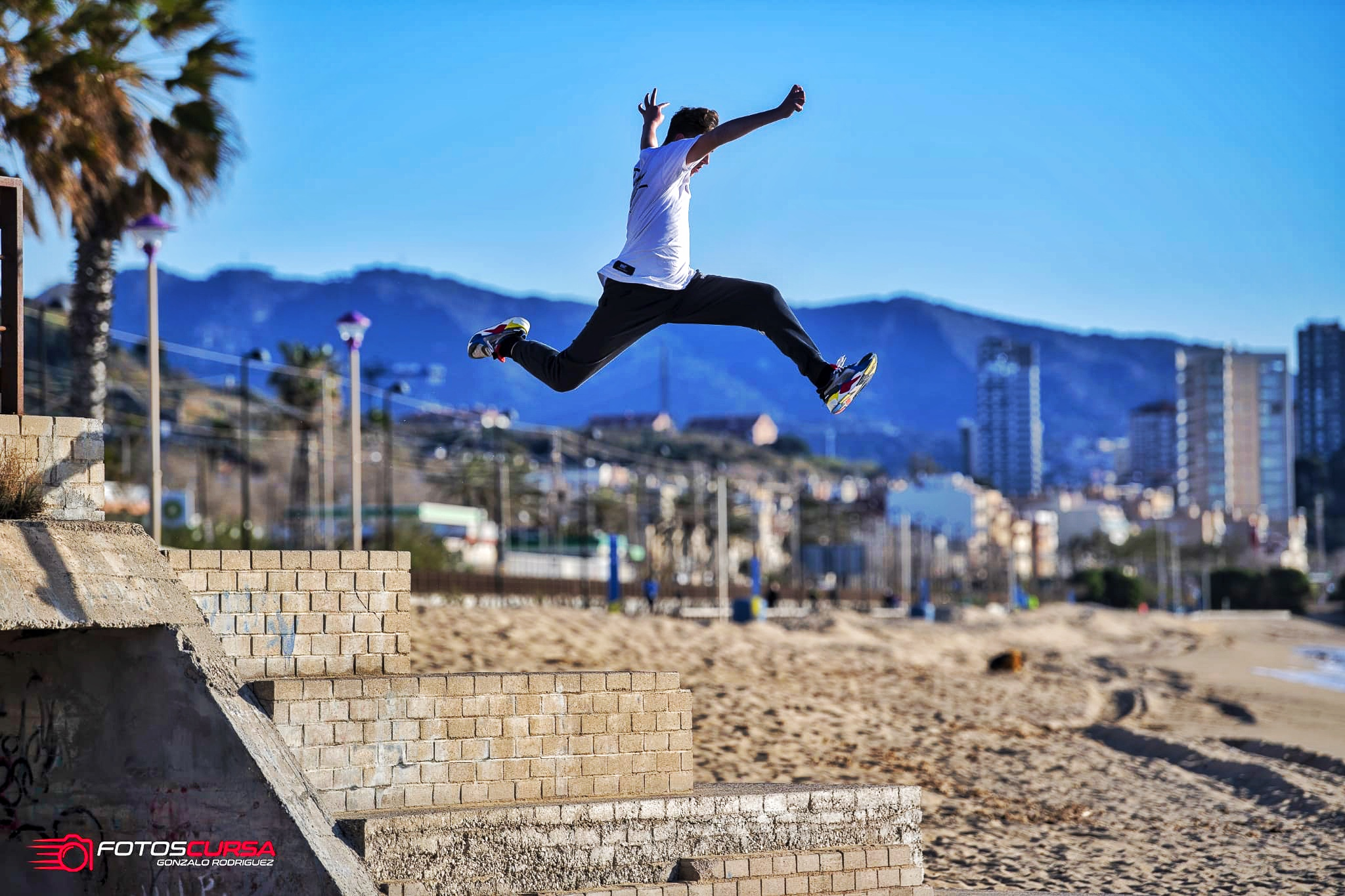 Traceur realizando un salto de longitud